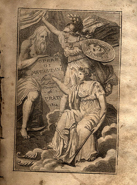 Portada de la recopilación de los libretos de Metastasio realizada en 1814